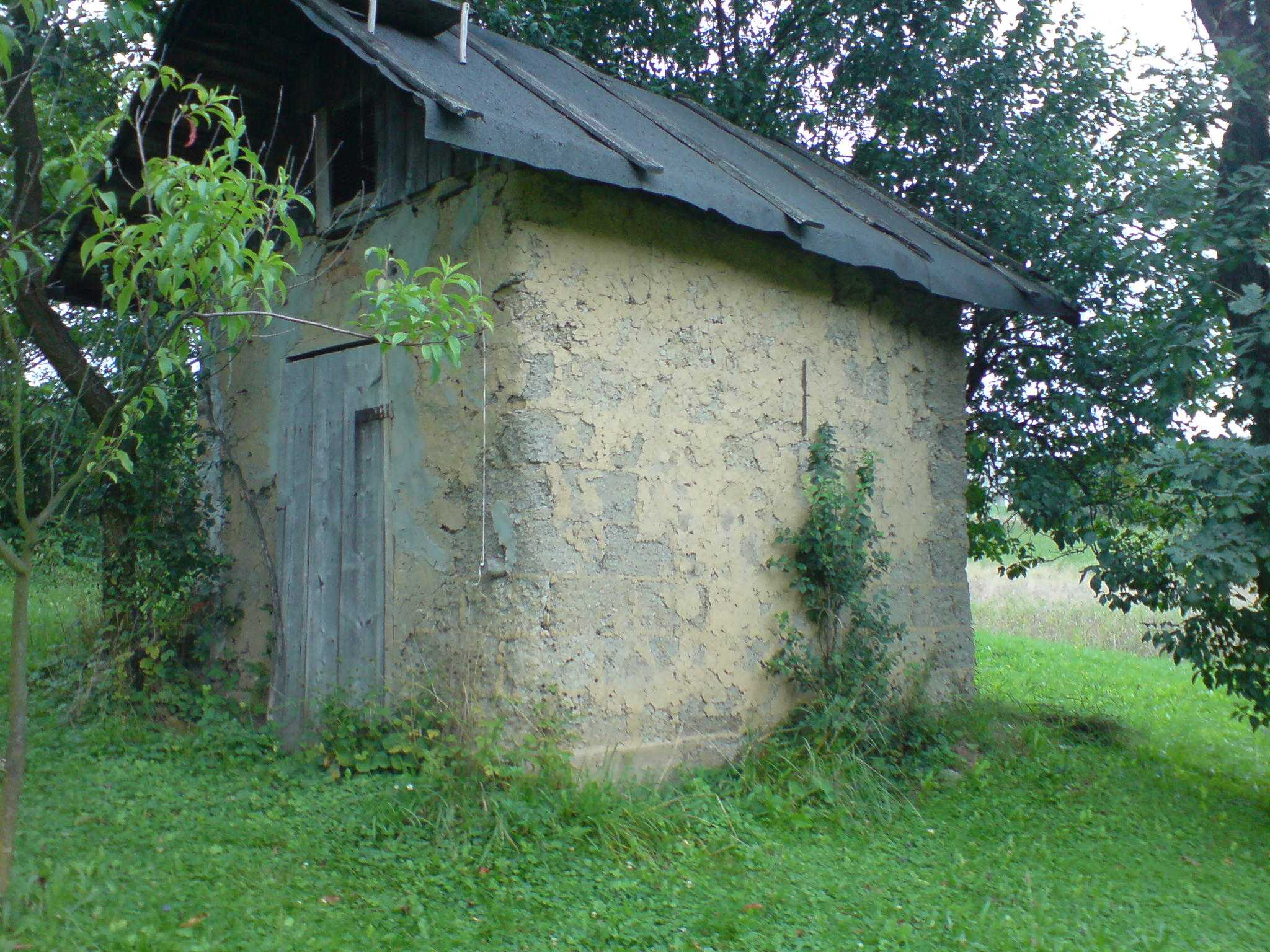 Lepianka